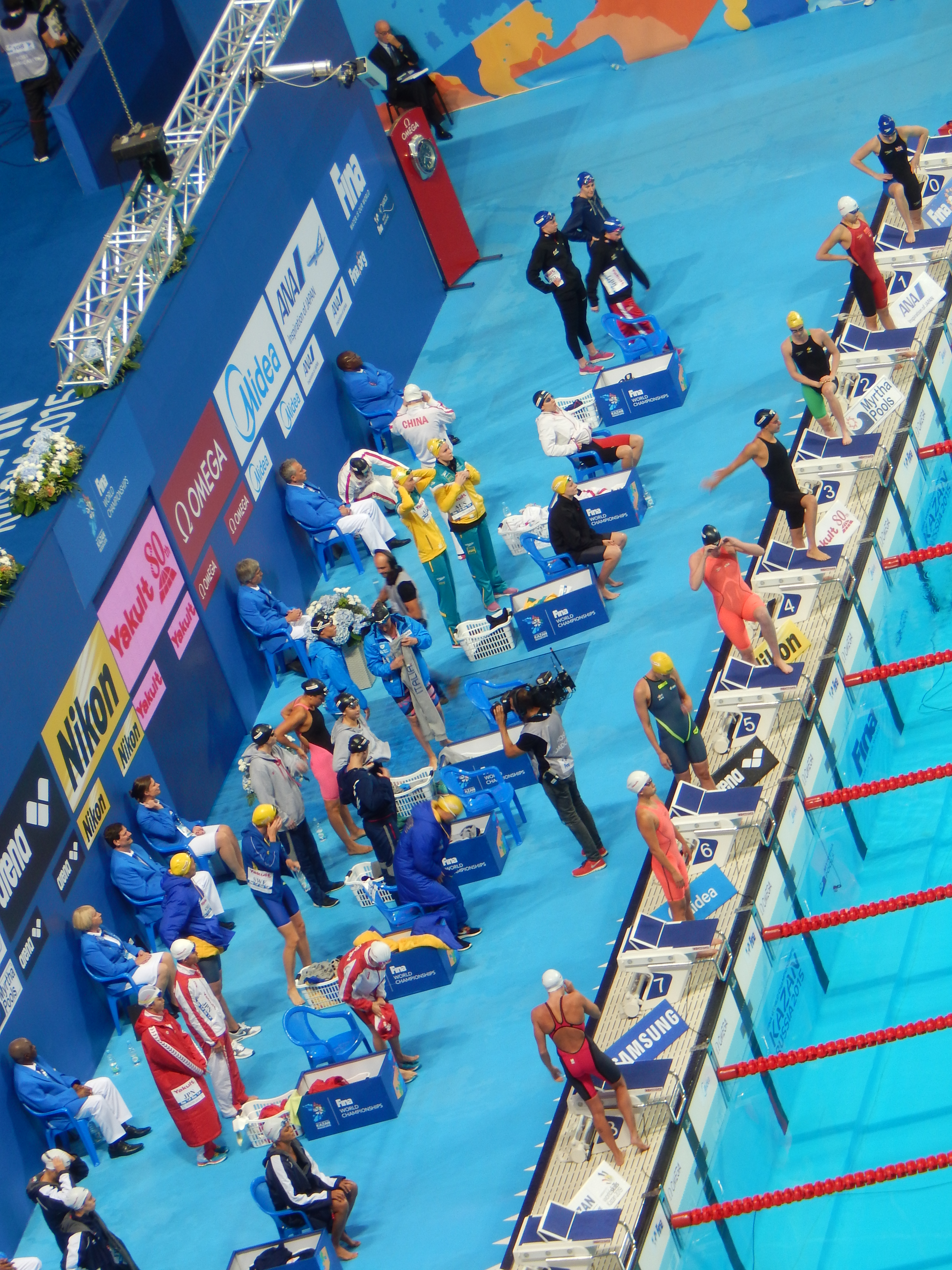 Финал эстафеты 4 по 200 метров у женщин в Казани